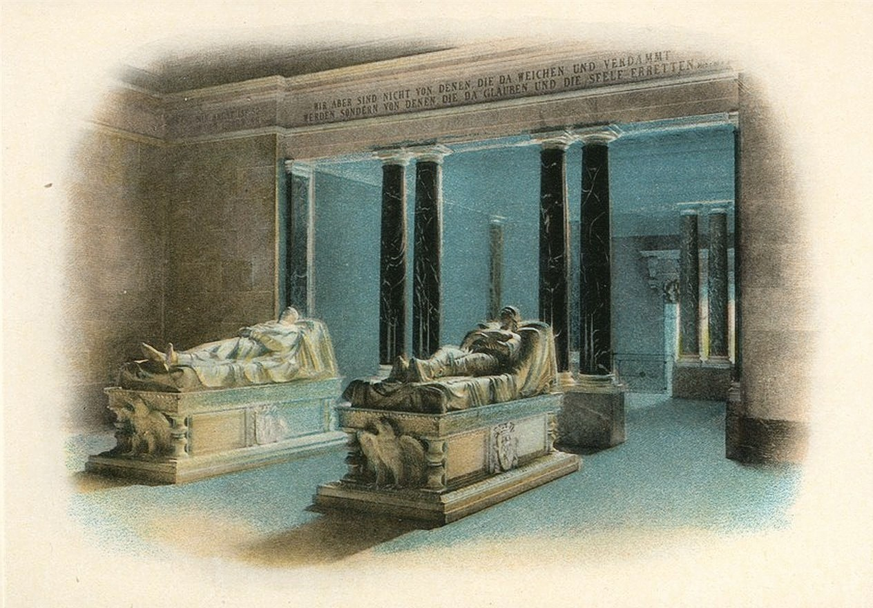 Berlin, Mausoleum für Königin Luise von Preußen im Schlosspark Charlottenburg, Innenansicht.